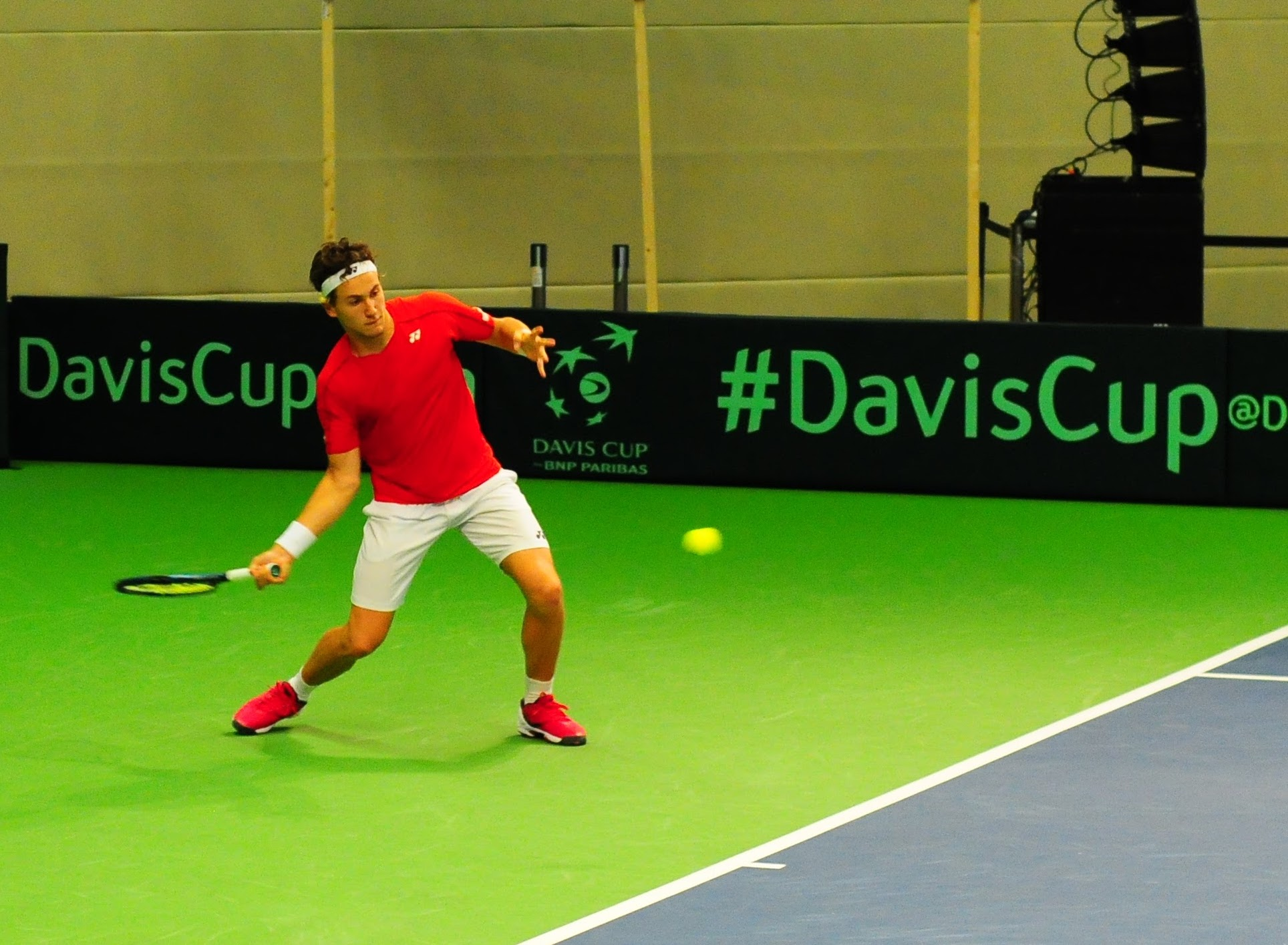 Casper Ruud mot Søren Hess-Olesen i Davis Cup-oppgjør.